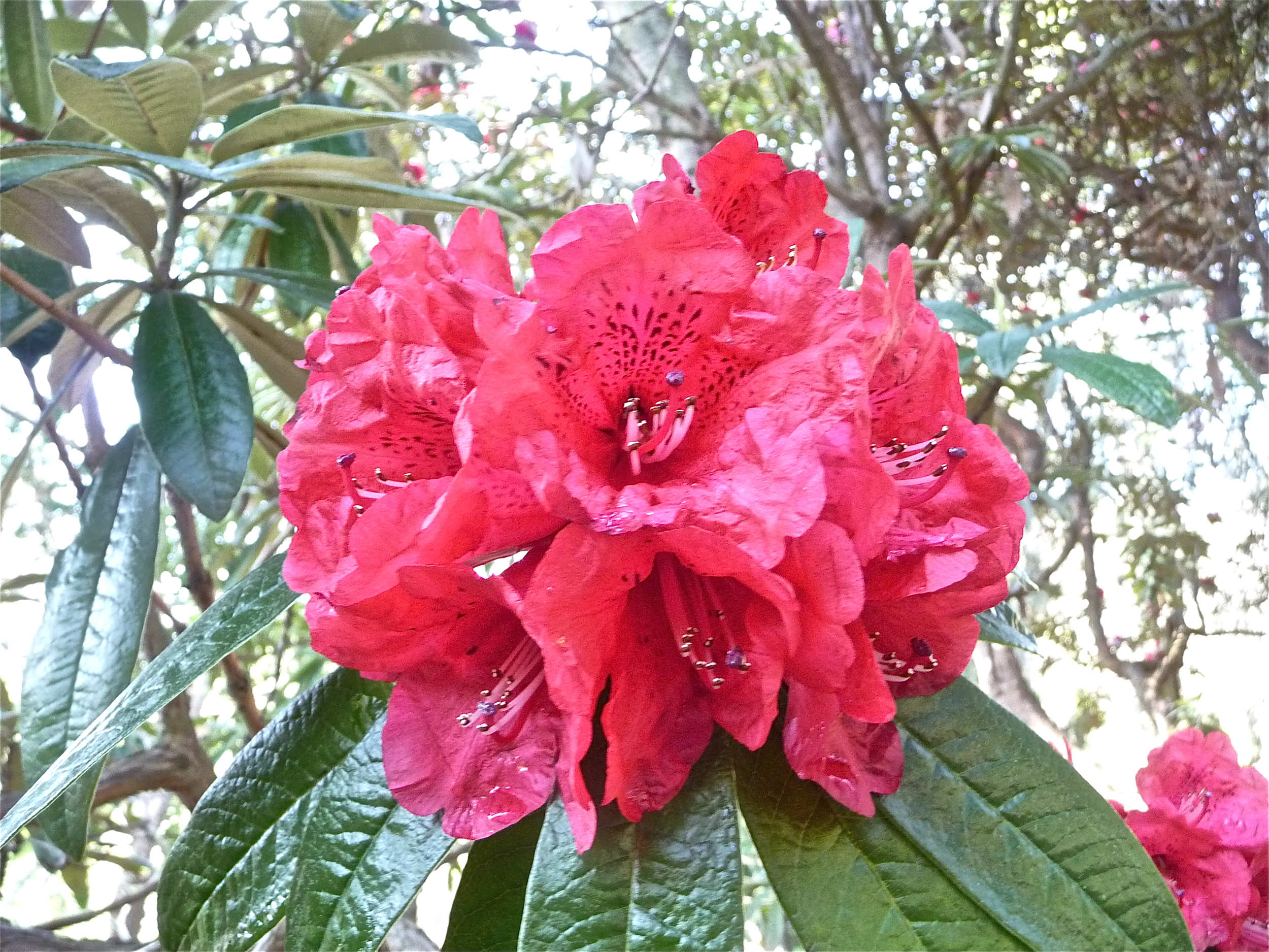 rhododendron arboreum